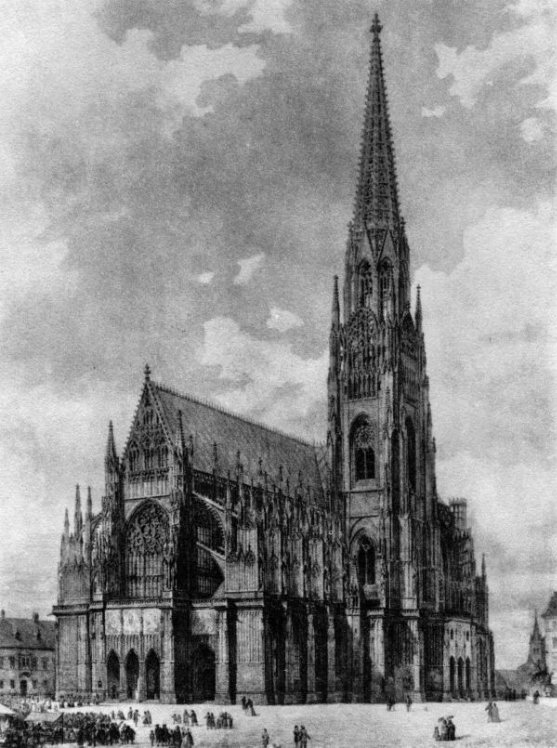 Hlavní chrám sv. Víta na hradě Pražském v svém ukončeni. Dle návrhu stavitele chrámu Josefa Krannera.